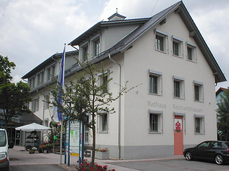 Rathaus von Reichartshausen